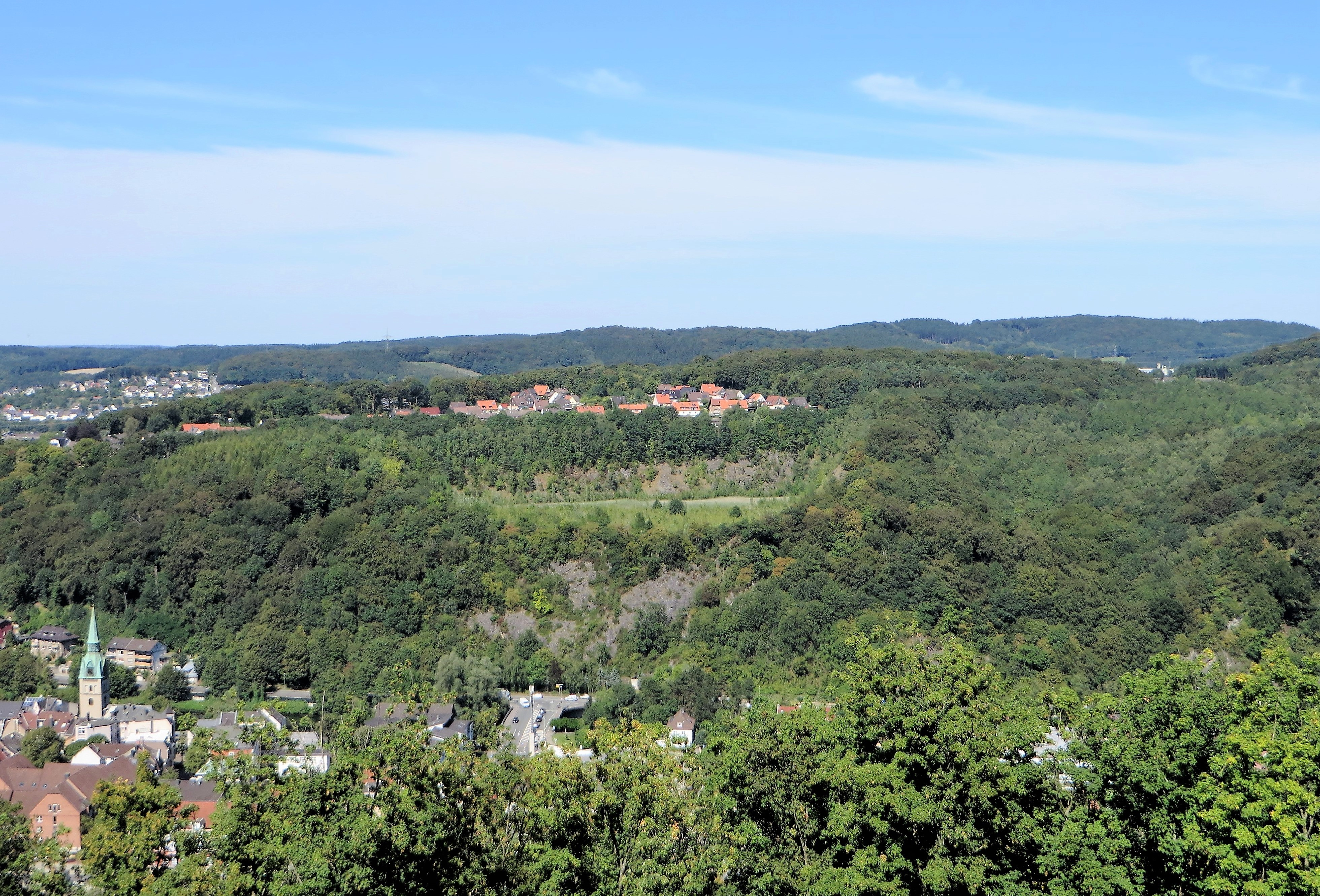 Naturschutzgebiet „Steltenberg“ im Hagener Stadtteil Hohenlimburg. Es handelt sich um die westlich an den Steinbruch der Hohenlimburger Kalkwerke angrenzenden Bereiche, die überwiegend aus Mischwaldkomplexen, kleine Siepen mit Hochstaudenfluren und Stillgewässern bestehen. Insbesondere im Bereich unterhalb des Möllerdenkmals erfüllt der Wald Bodenschutzfunktion (links). Am Steilhang zur Lenne (Mitte bis rechts) befinden sich mehrere geologische und auch archäologisch bedeutsame Höhlen, z.B. die Oeger Höhle (39 m), Dr.-Wolf-Höhle (161 m) und Seegrotte (159 m). Auf dem Foto sieht man in der Mitte vor der Siedlung „Auf der Heide“ den 1967 stillgelegten Kalksteinbruch „Rolloch I“ der Hohenlimburger Kalkwerke. Dort wurde das gewonnene Gestein einst auf Loren verladen und zur Aufbereitung mit einer Kleinbahn zum Oeger Werksgelände transportiert.